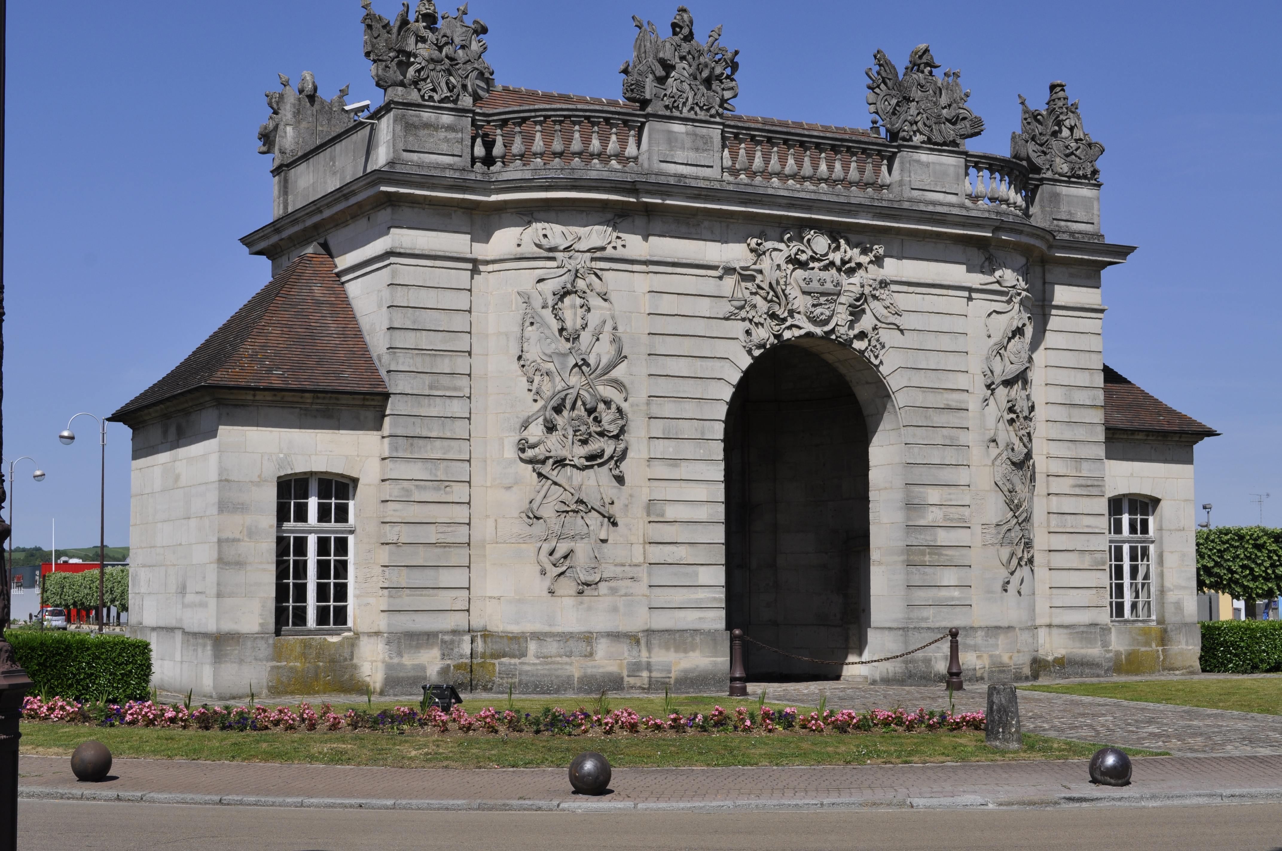 Vitry-le-François : centre ville, porte du Pont.